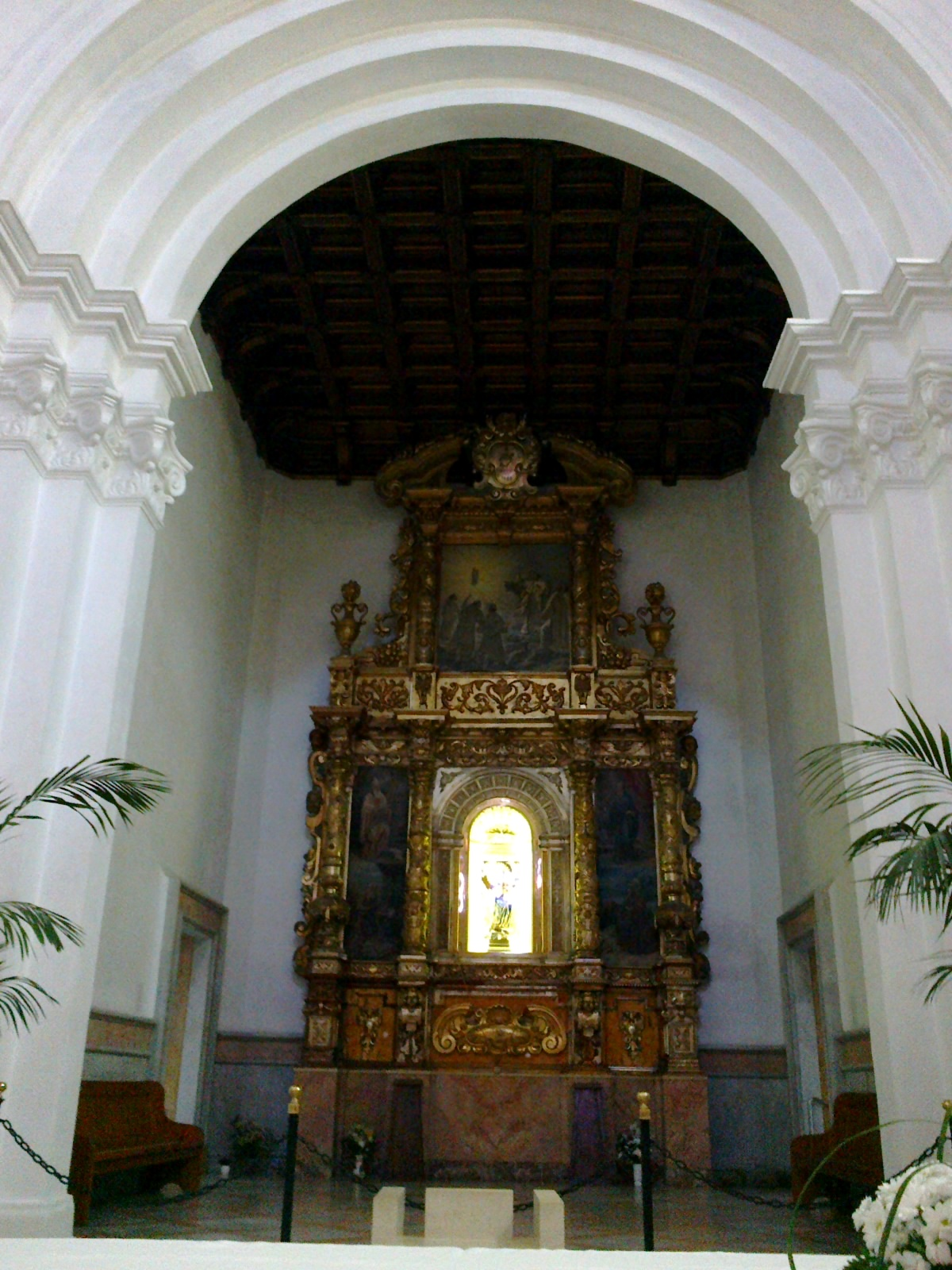 Minorque Monte Toro Place Eglise Choeur